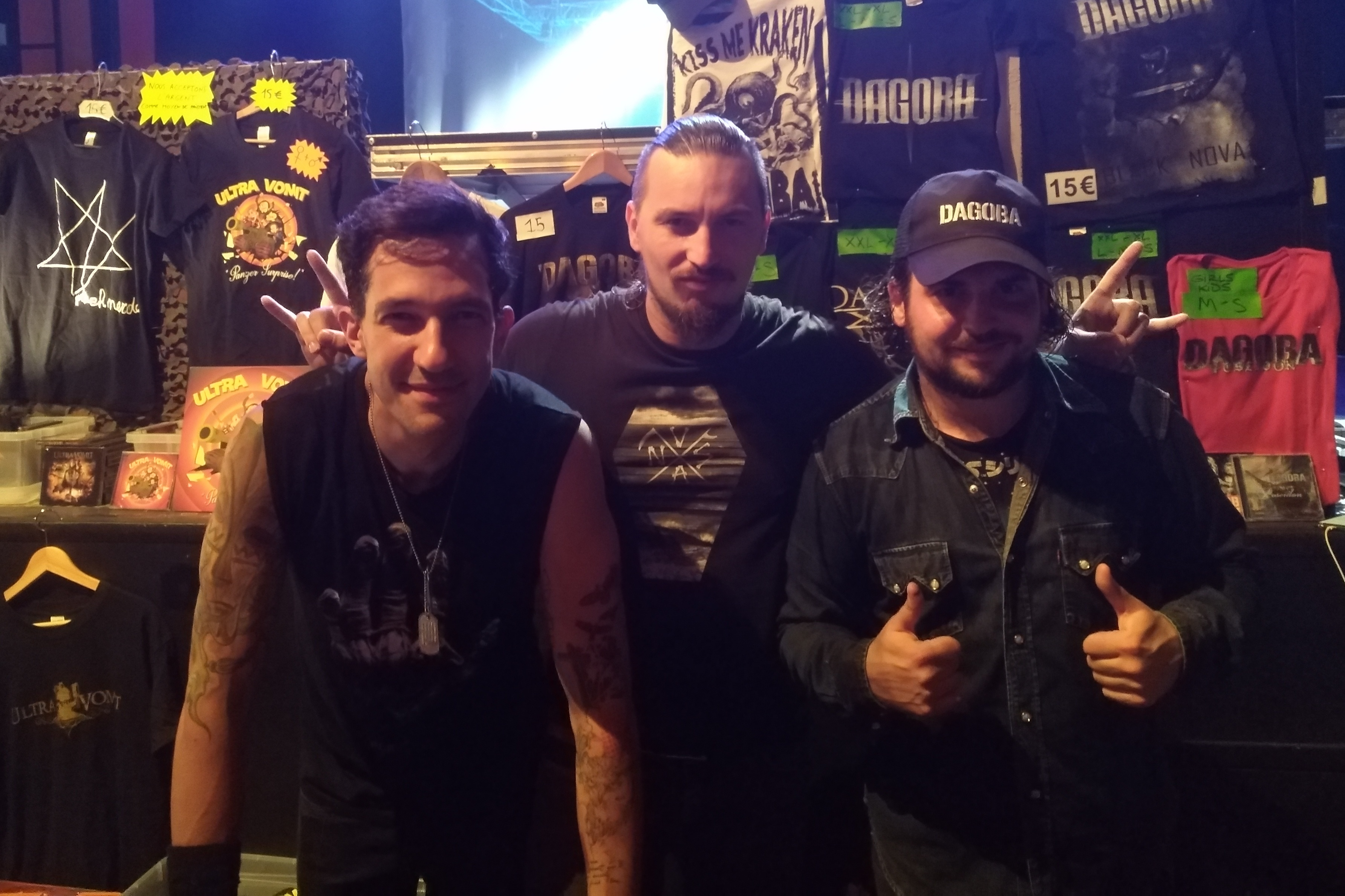 Membres du groupe Dagoba après un concert à Saint-Étienne (Loire, France).